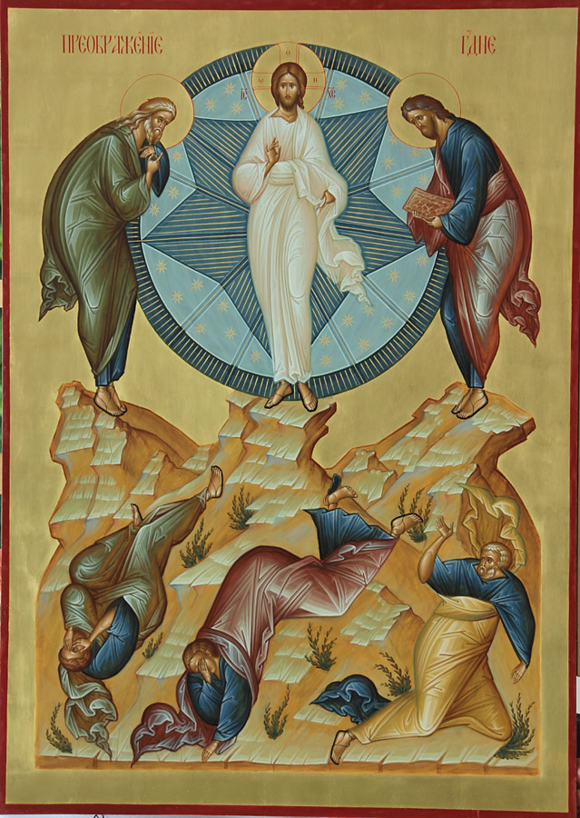 Преображение